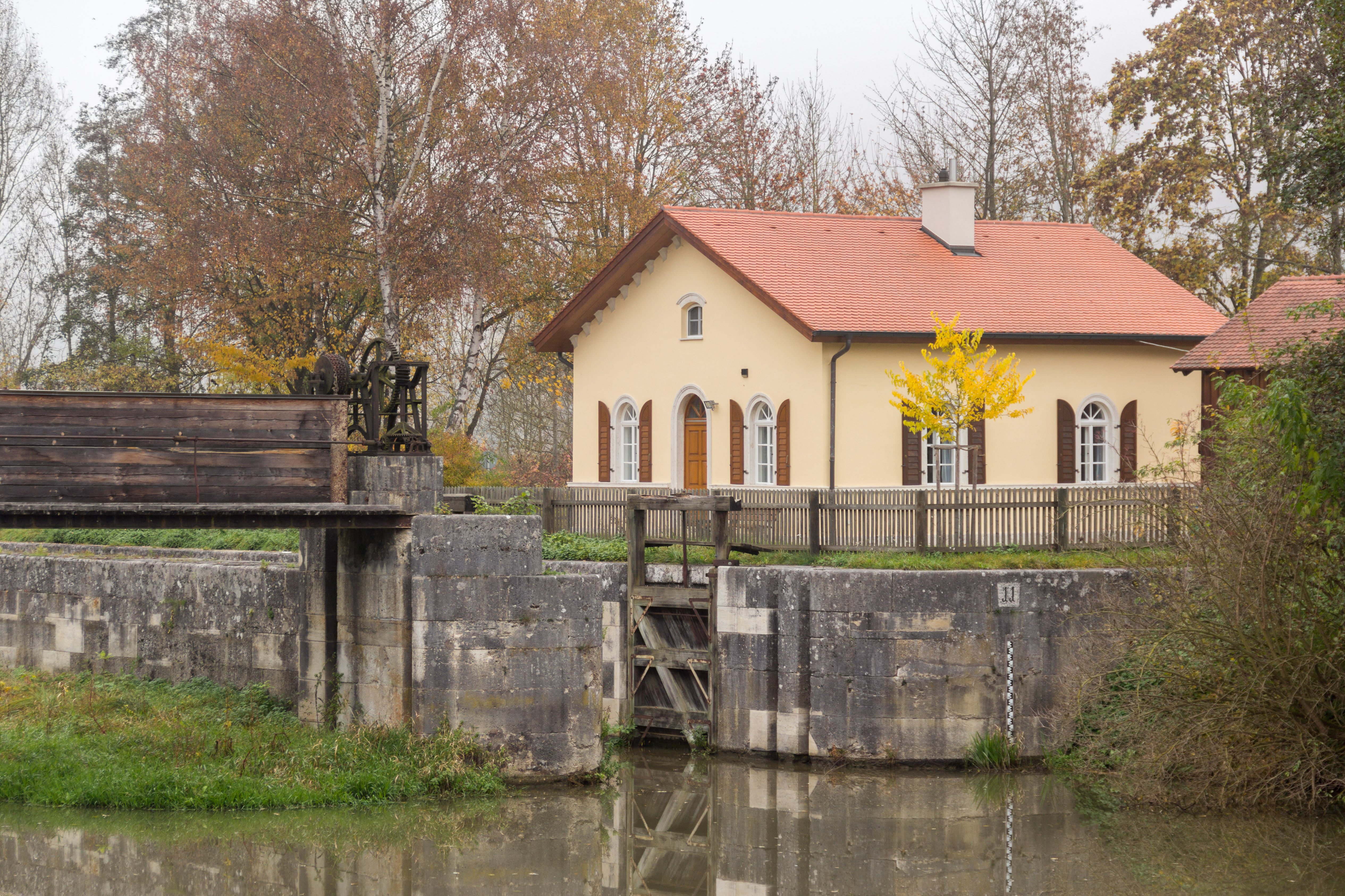 Ludwig-Donau-Main-Kanal, Schleuse 11, Schleuse, Riedenburg, Deising